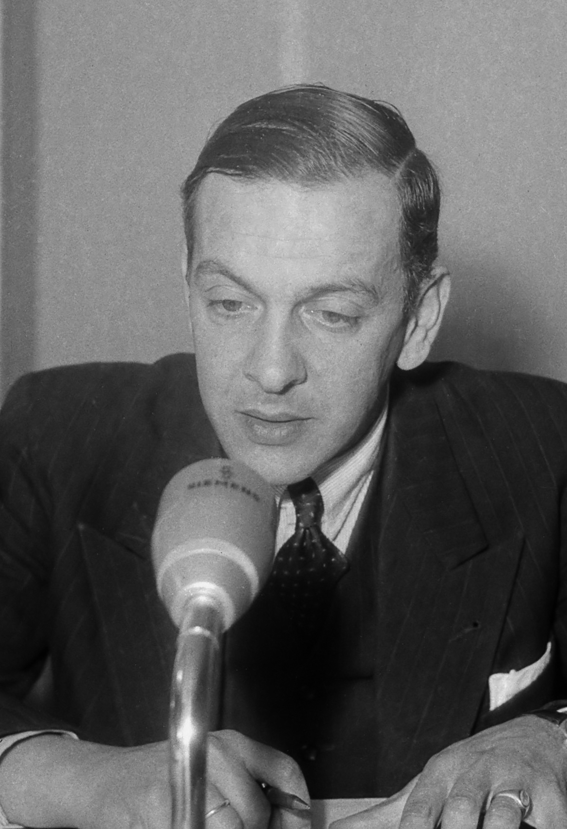 De heer Landré, bekend als Fox van Herrijzend Nederland, voor de microfoon, 1945, Eindhoven